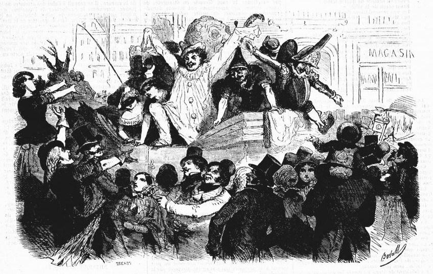 Le Carnaval de Paris sur les Grands Boulevards en 1828.